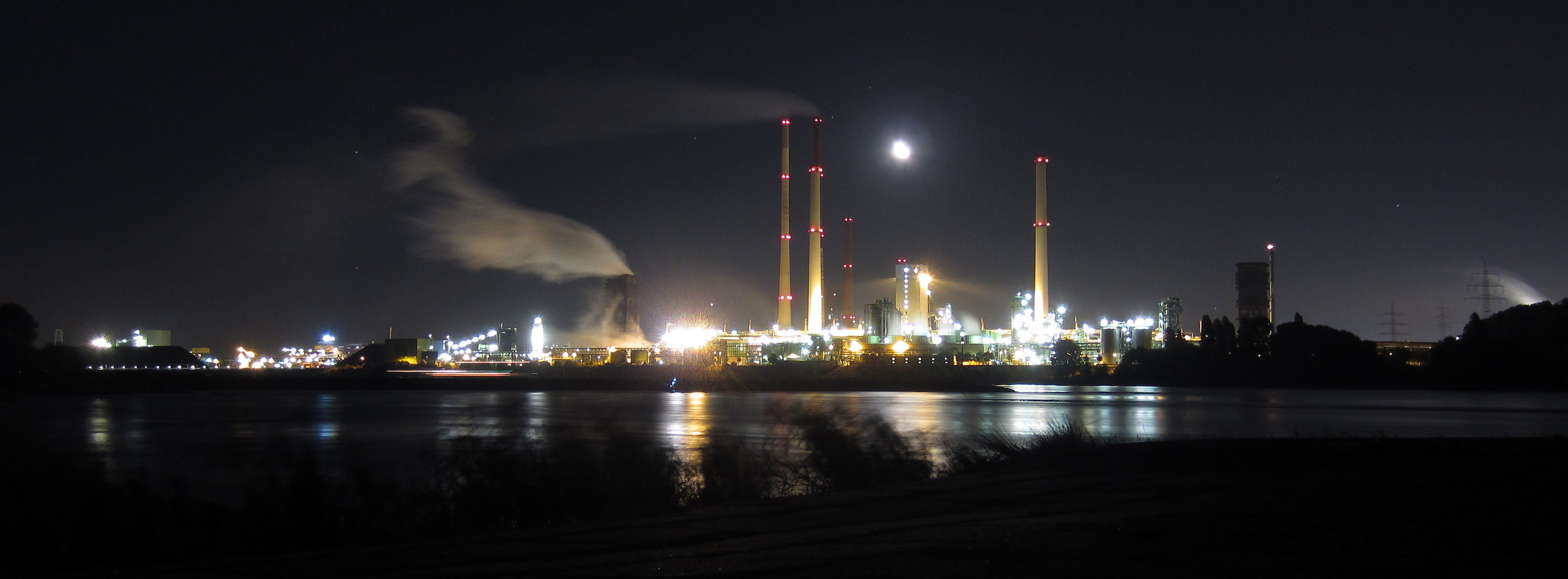 Kokereibetrieb Schwelgern GmbH in Duisburg-Bruckhausen bei Nacht mit dem Rhein im Vordergrund, von Binsheim-Woltershof aus gesehen